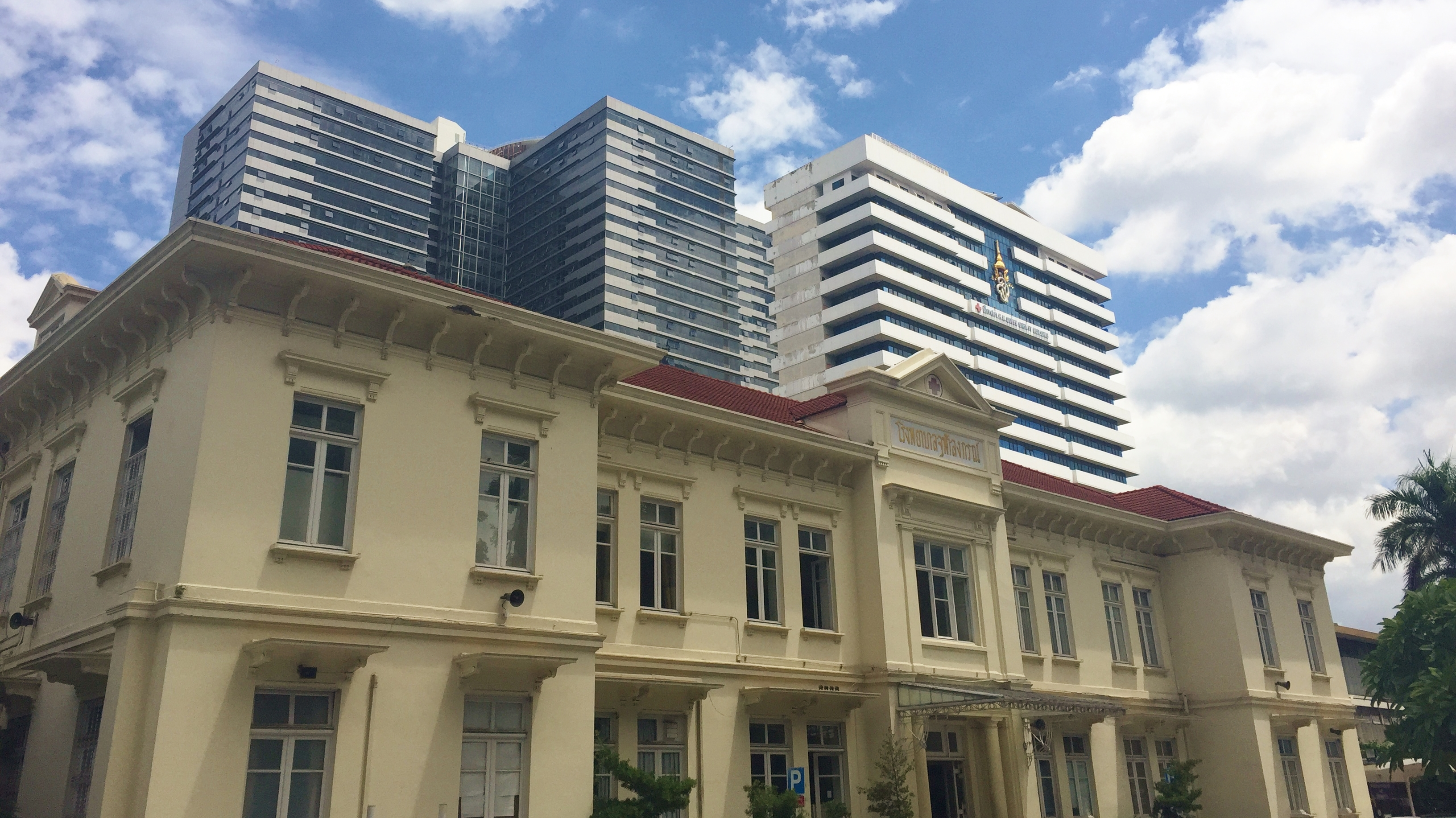 โรงพยาบาลจุฬาลงกรณ์ สภากาชาดไทยและคณะแพทยศาสตร์ จุฬาลงกรณ์มหาวิทยาลัย